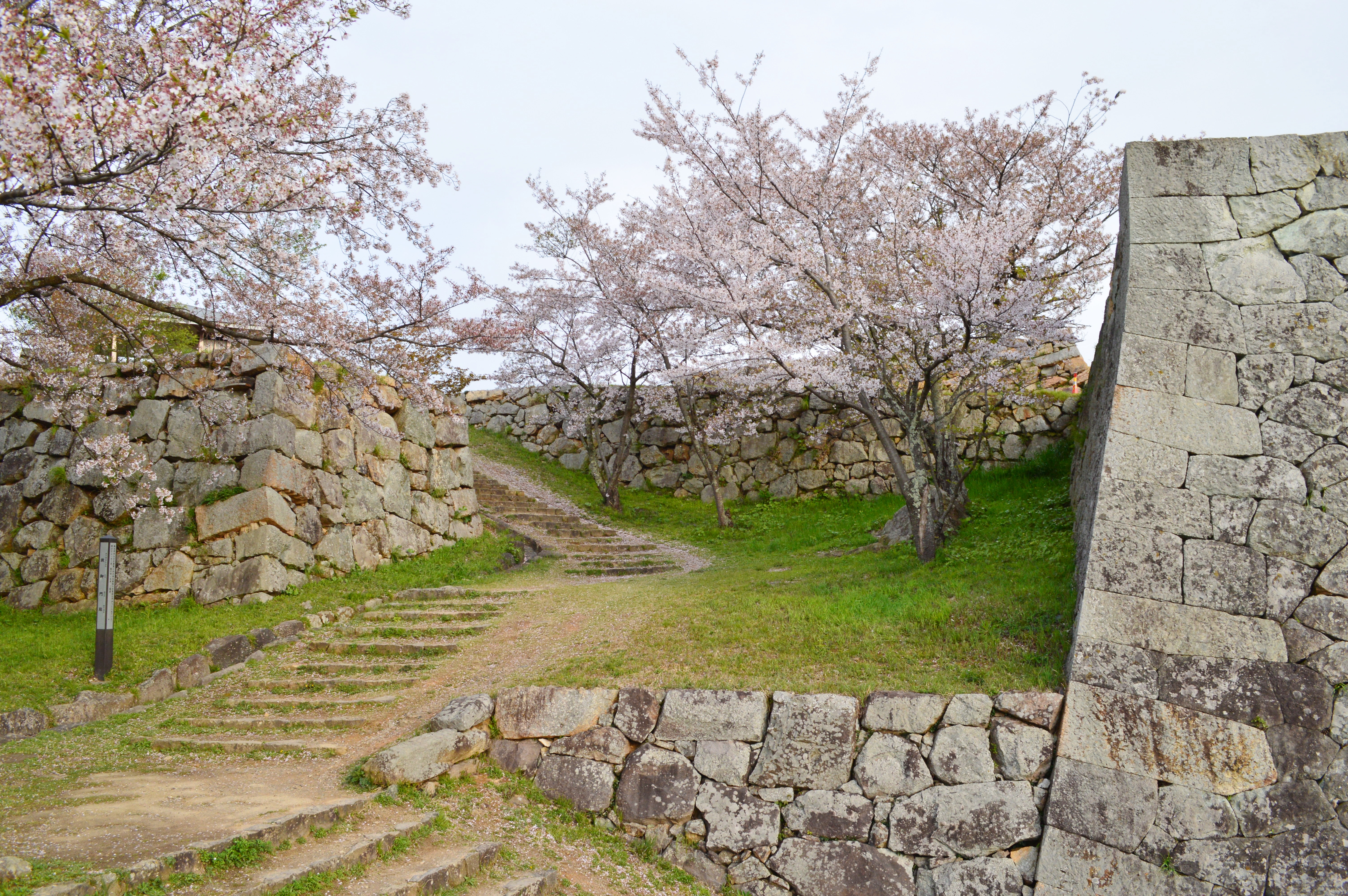 米子城 鉄御門 Nikon D3200